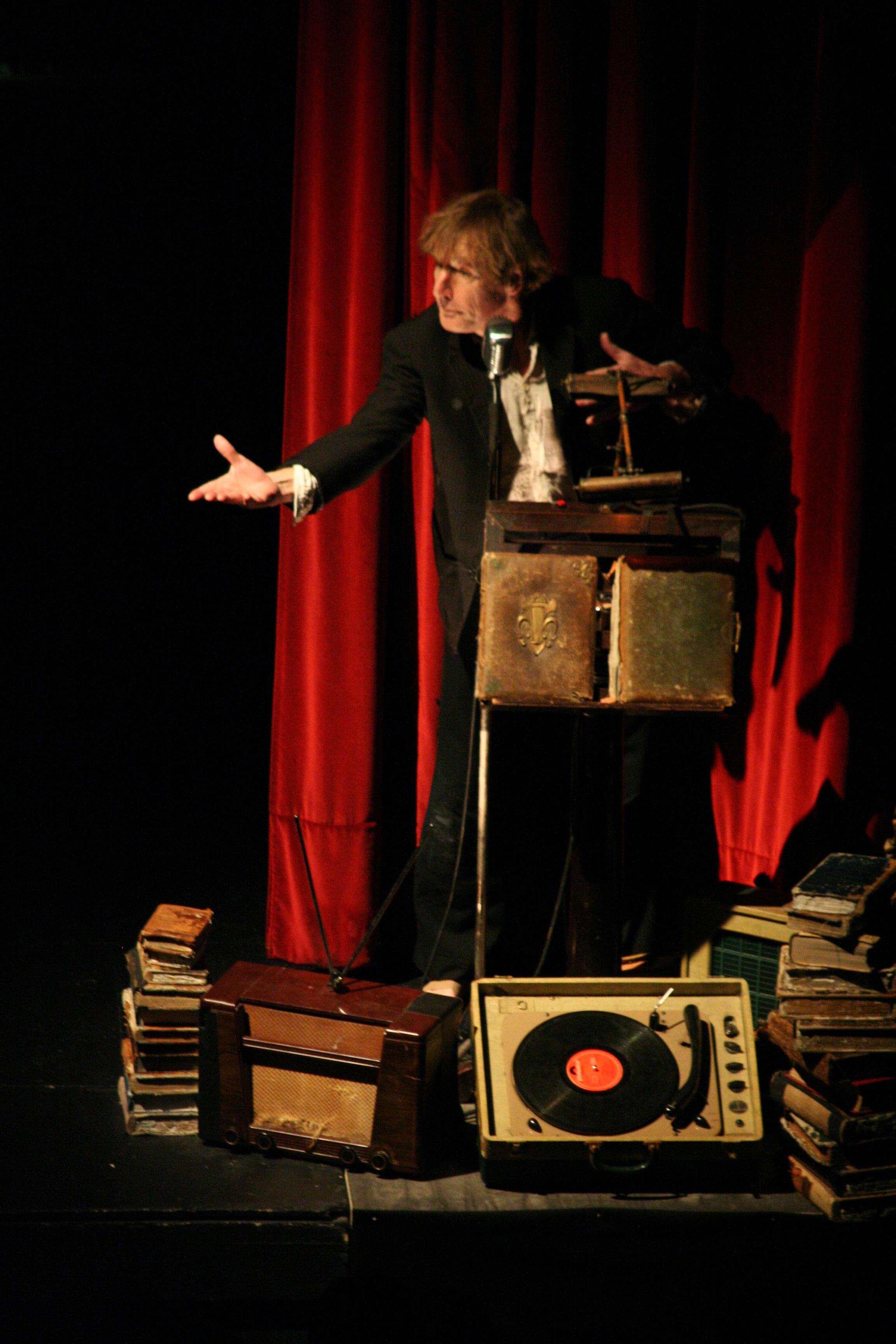 Svalvola,foto scattata durante lo spettacolo La Veillée des Abysses a Genova